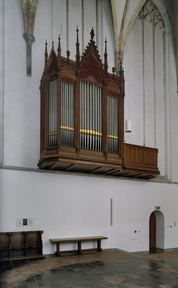 Sint Janskerk: Interieur, aanzicht orgel, orgelnummer 1515 (opmerking: Gefotografeerd voor Het Historische Orgel in Nederland 1858-1865)